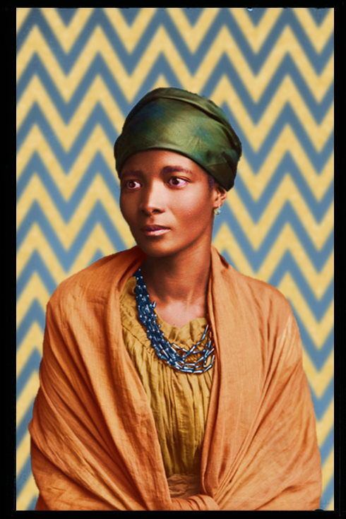 "Xiniwe", refotografia de 2019 por Pedro Toniazzo Terres. Edição de imagem a partir da fotografia da artista sul-africana Eleanor Xiniwe em Londres, 1891.